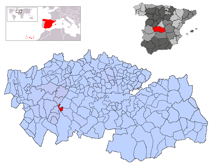 Santa Ana de Pusa en la provincia de Toledo